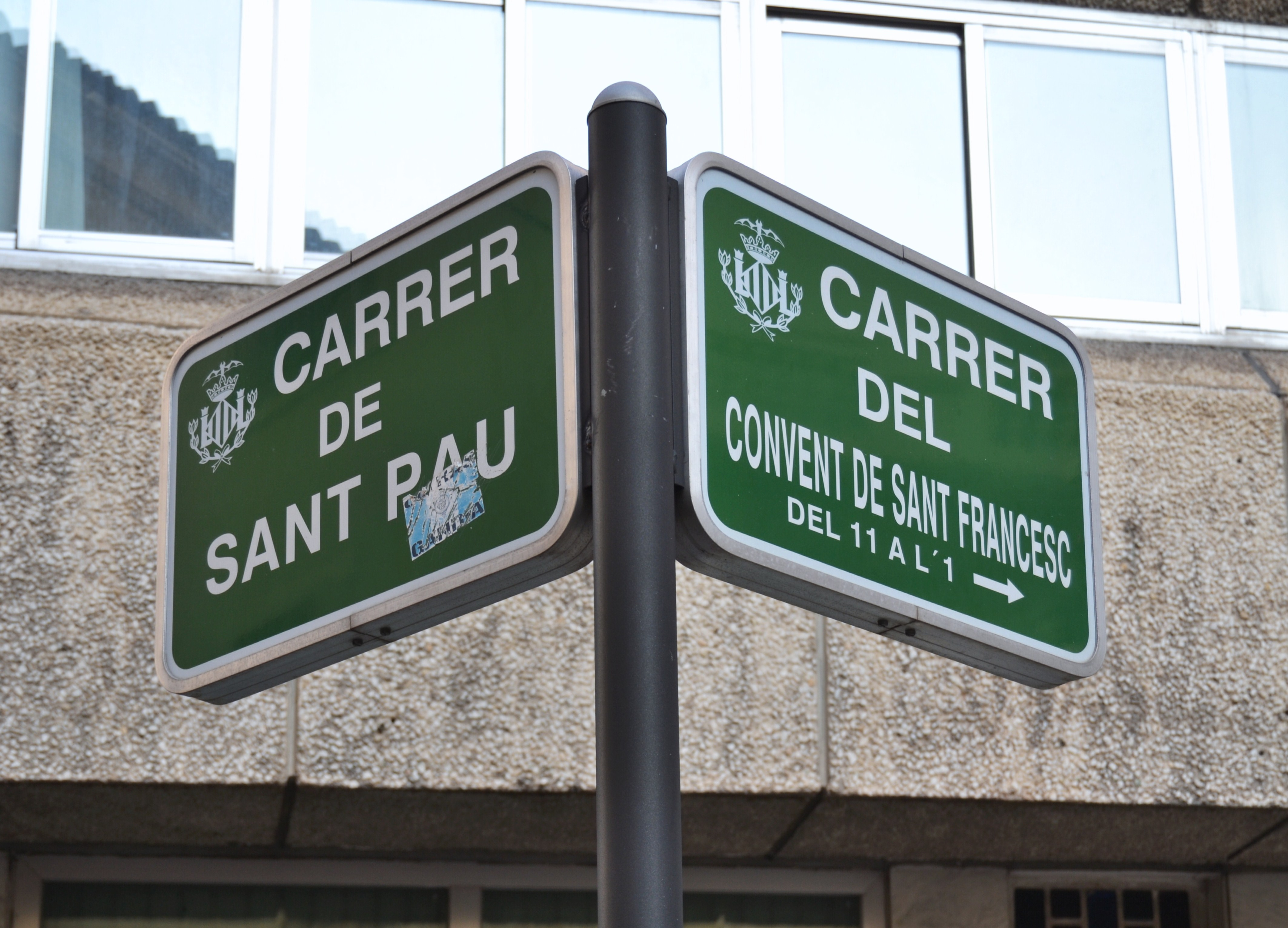 Carrer de sant Pau i carrer del convent de sant Francesc de València, plaques.